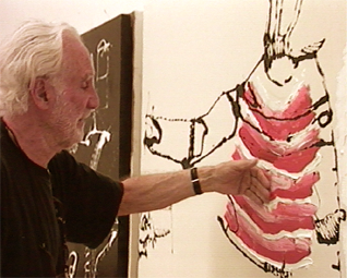 Portrait de François Arnal